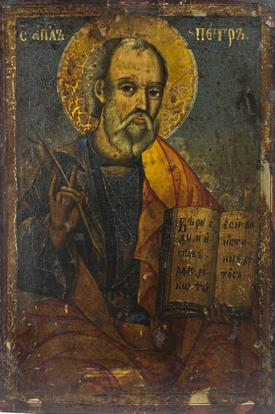 Св. Петар, црква Св. Мина, с. Волковија. Околу 1855 година. Автор: се атрибуира на Дичо зограф. Дим: 38 Х 25,5 Х 3 см.